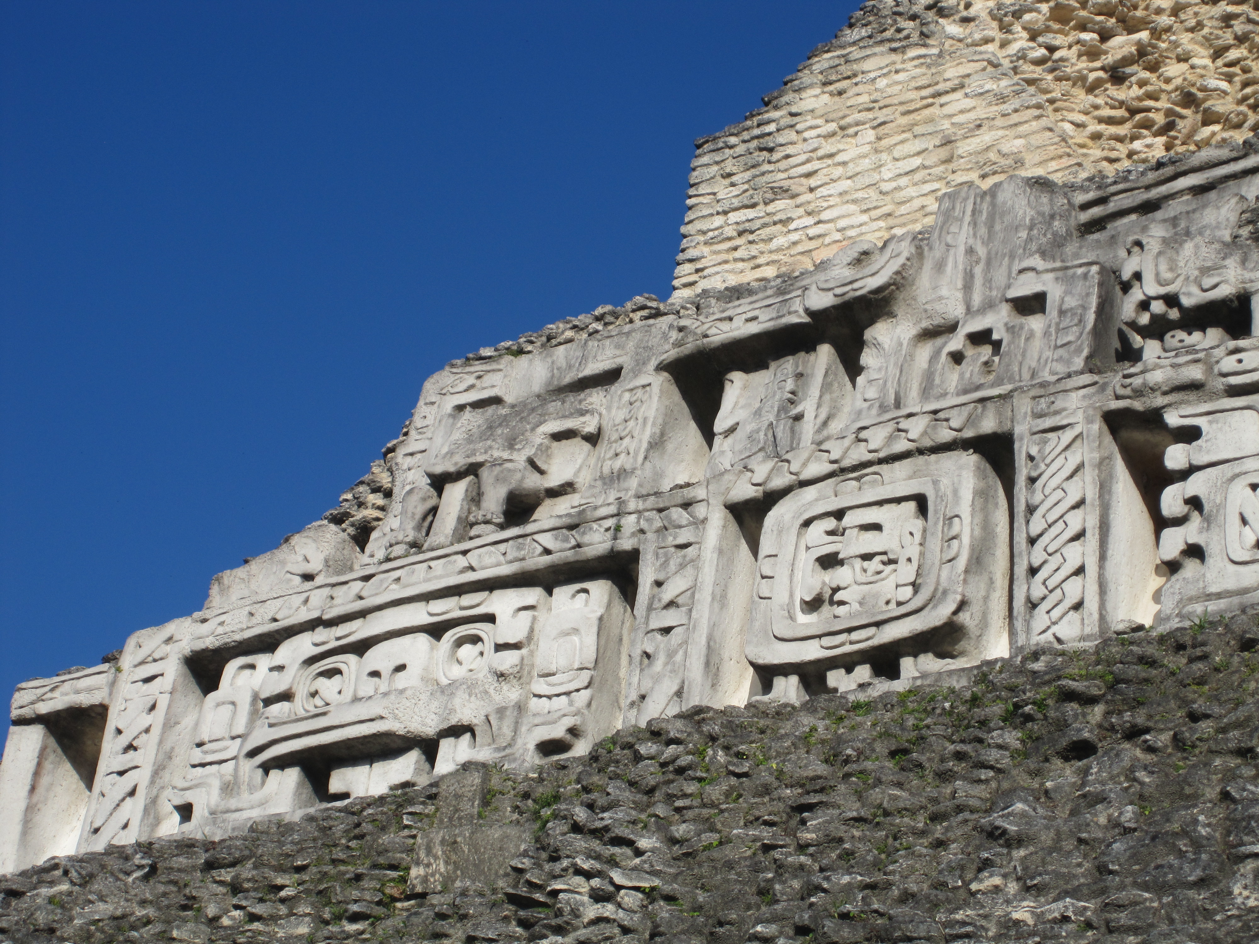 El Castillo - Westfront der Hauptpyramide. Das sichtbare Stuckrelief ist eine Glasfibernachbildung, die das ca. einen Meter weiter innen befindliche Original schützen soll.